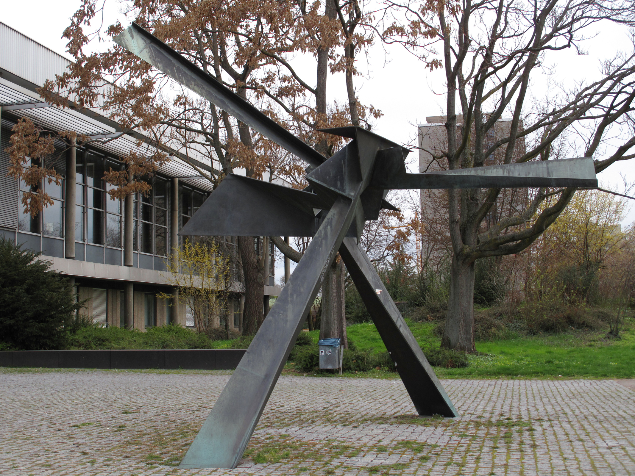 Hans Uhlmann, Aggression I, 1961, Stuttgart-Mitte, Stadtpark Stuttgart bei der Universität, Keplerstraße